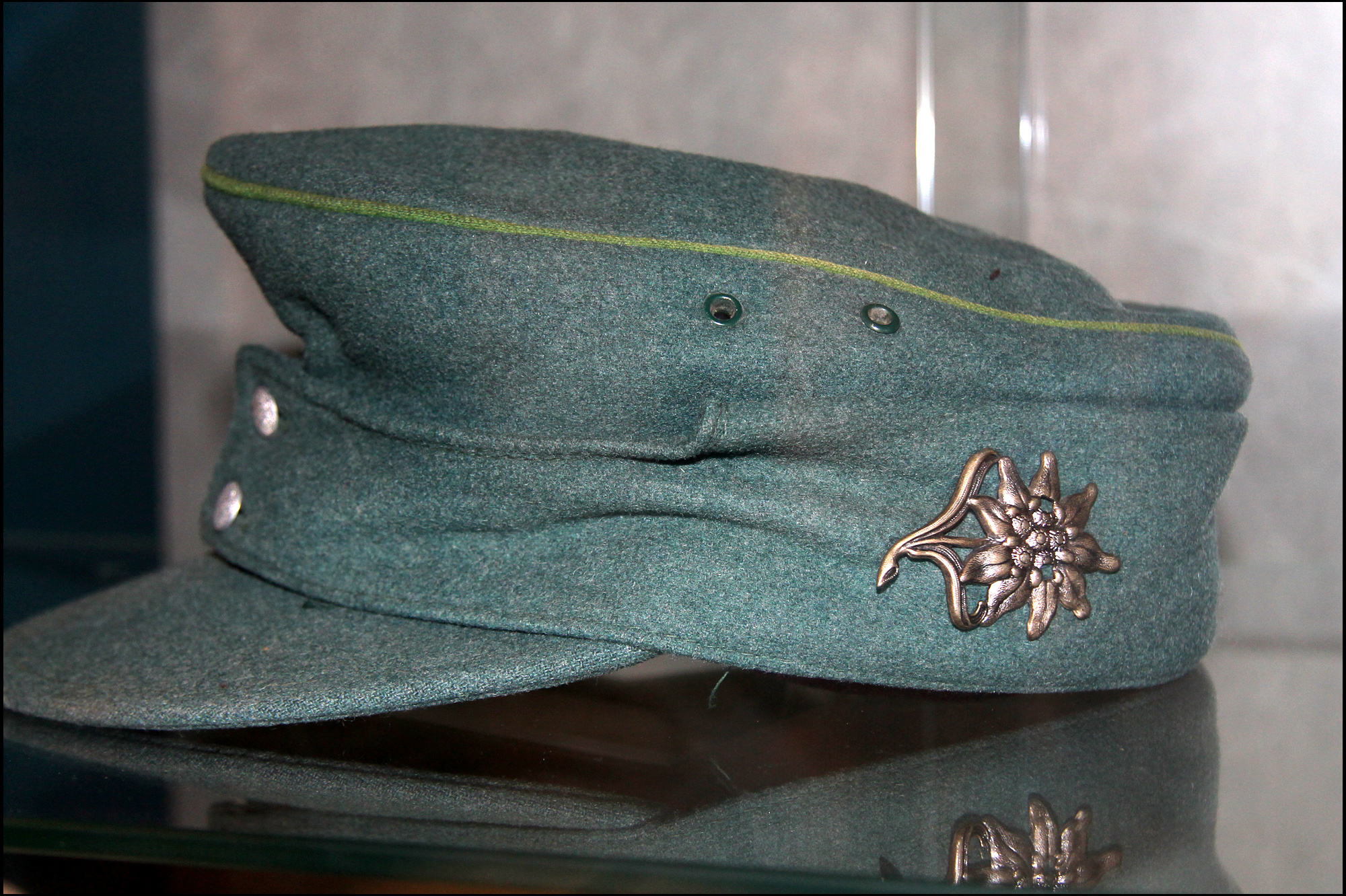 Deutsche Uniformmütze eines Gebirgsjägers im II. Weltkrieg. Exponat einer Ausstellung von Berg-Bekleidung. Yvoire, Frankreich 2014